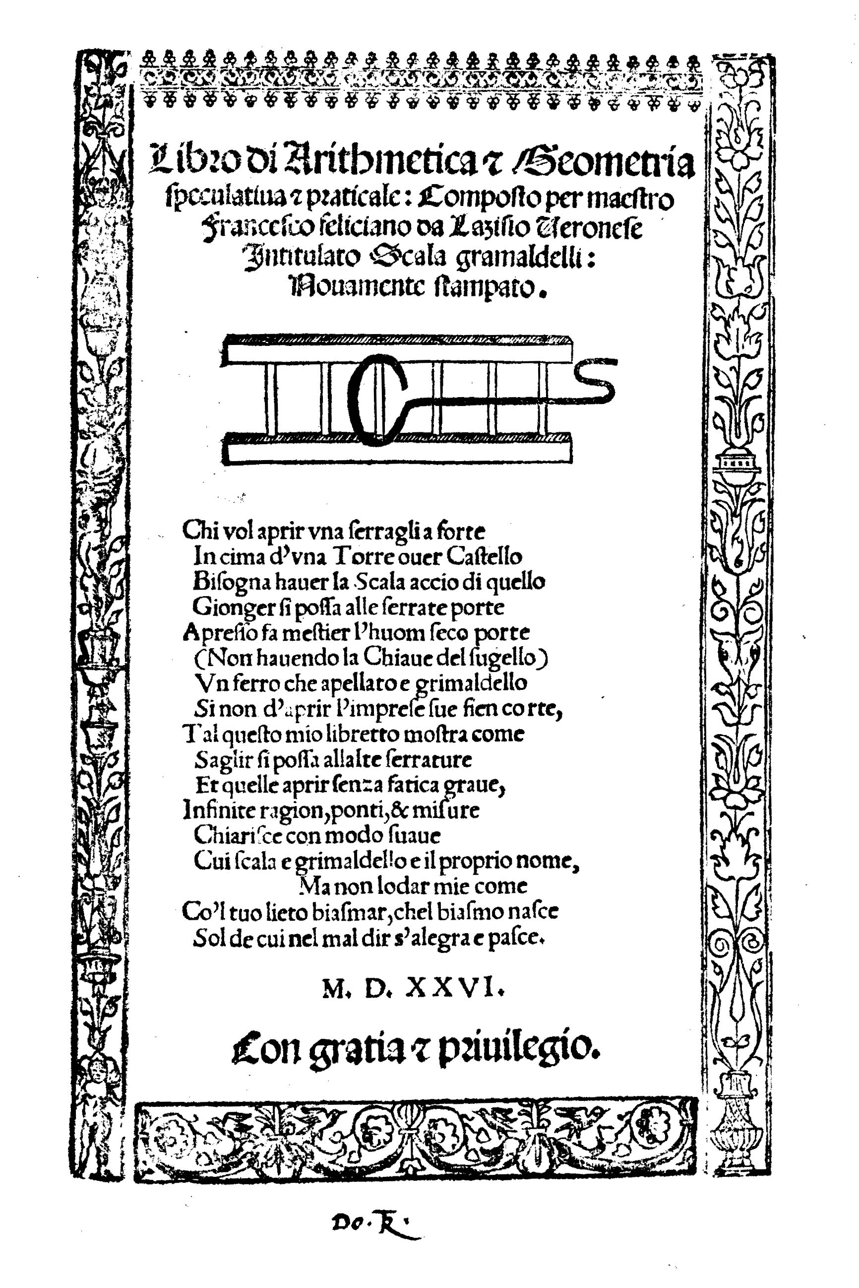 Libro di arithmetica & geometria speculatiua & praticale: composto per maestro Francesco feliciano [sic] da Lazisio veronese intitulato Scala gramaldelli. Nouamente stampato. - [S. l. : s. n., s. d.] (Stampato nella inclita citta di Vinegia : … per Francesco di Alessandro Bindoni, & Mapheo Pasini, compagni). - 4, [76] c. : ill. ; 4º .